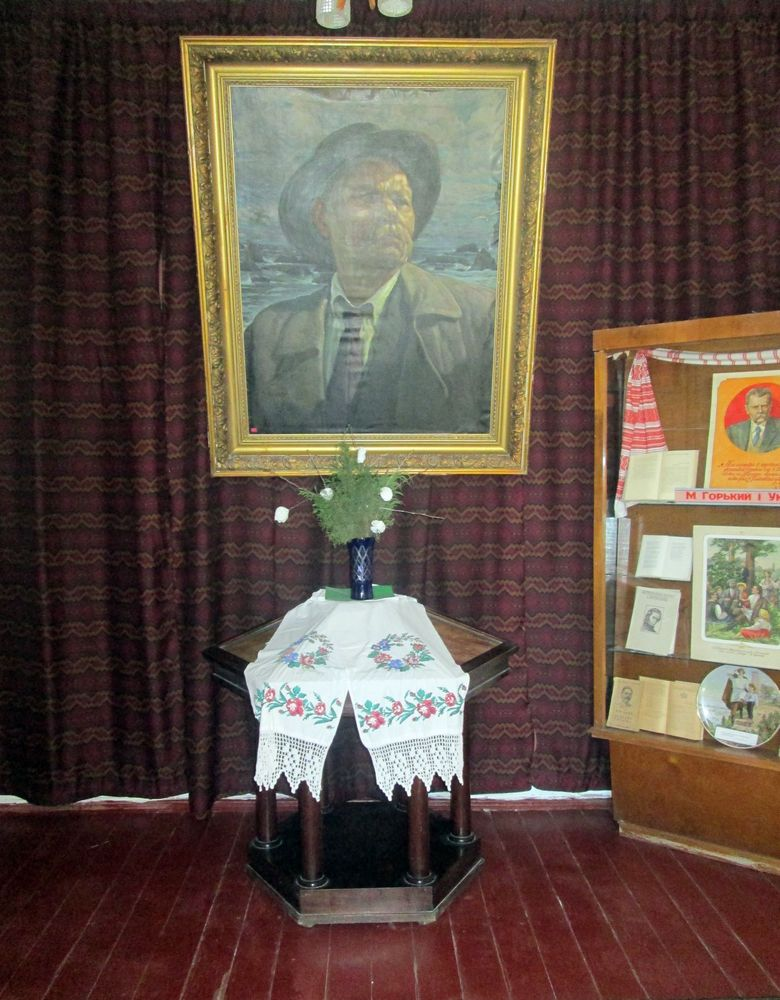 Вестибюль Мануйлівського літературно-меморіального музею Максима Горького у селі Верхня Мануйлівка (Козельщинський район, Полтавська область, Україна). Копія портрету Максима Горького роботи художника І. І. Бродського (1937) з колекції Третьяковської галереї у Москві, Росія.